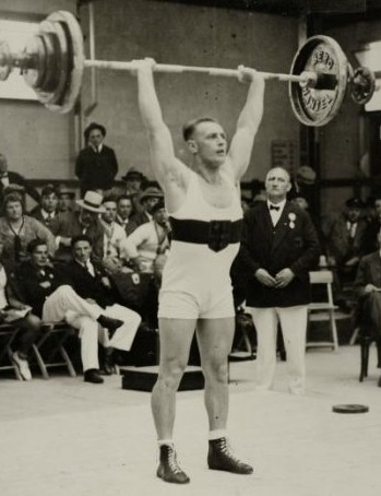 Sport. Sport, Olympische Spelen 1928, Amsterdam : De Duitser Franz Zinner in actie tijdens het gewichtheffen tot 75 kg.